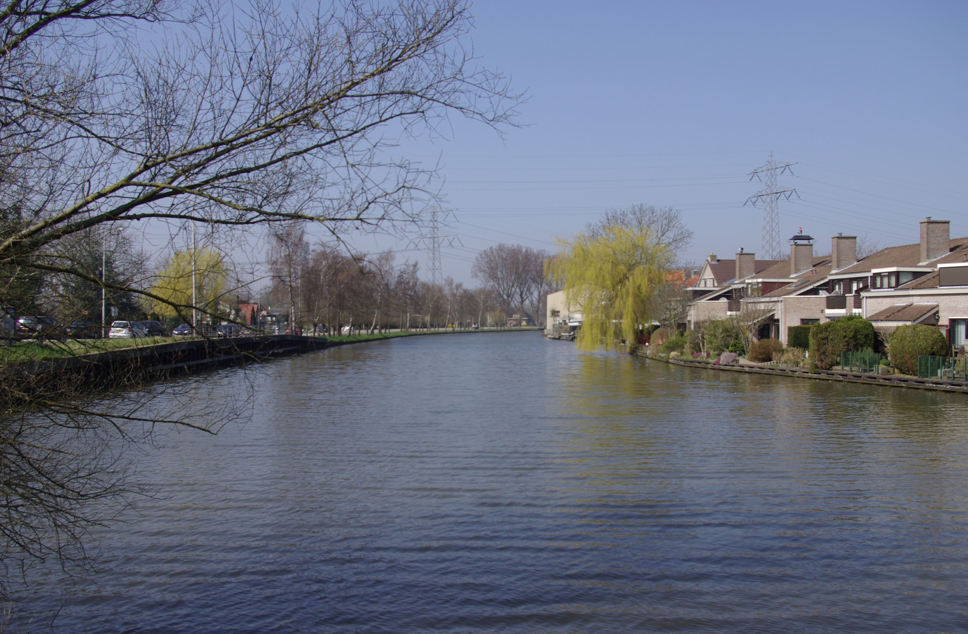 Der Fluss Gaasp in Driemond, Amsterdam